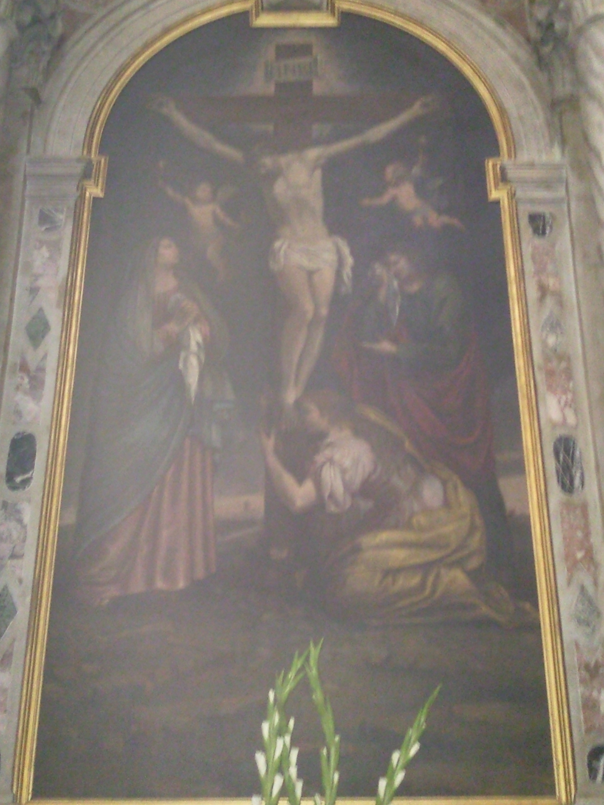 Pala della Crocifissione a Cappella di Scorzè - sec. XVII